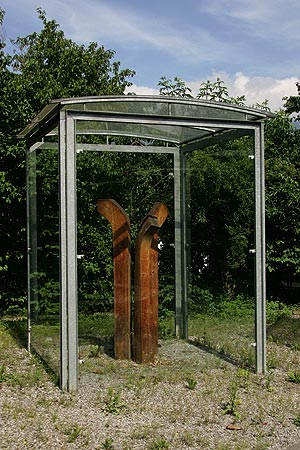 Sachseln: Ausstellung beim Bruder Klaus Museum